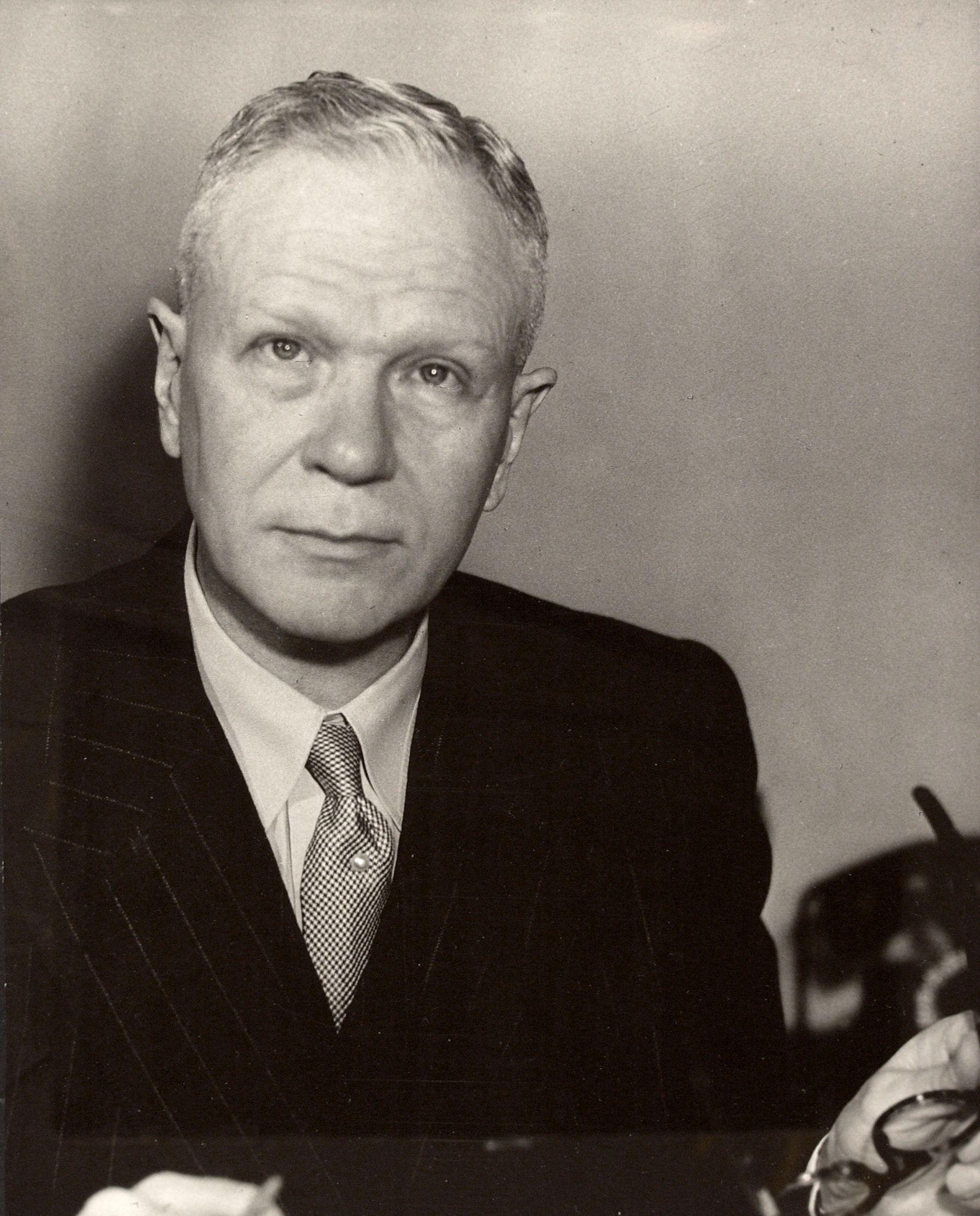 Portret van Lubertus Götzen, minister van kolonieën van 1947-1951. 9 maart 1948.